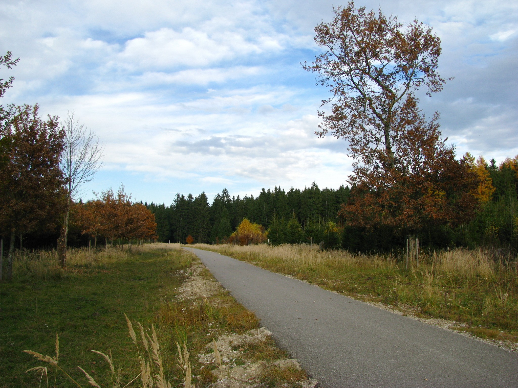 Karolinengeräumt im Forstenrieder Park, zwischen Zyllnhard- und Preysinggeräumt, Richtung Nordost